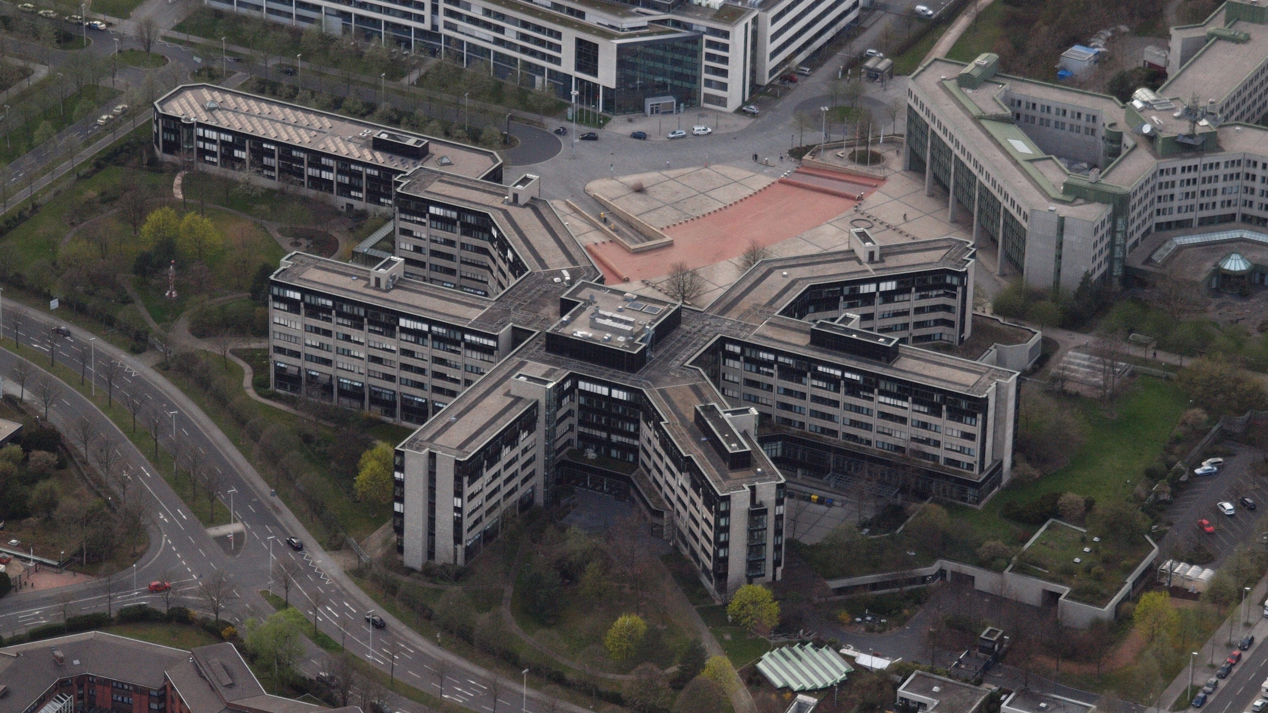 Bundesministerium für Verkehr und digitale Infrastruktur (zum Zeitpunkt der Aufnahme: Bundesministerium für Verkehr, Bau und Stadtentwicklung), Robert-Schuman-Platz, Bonn-Hochkreuz: Luftaufnahme